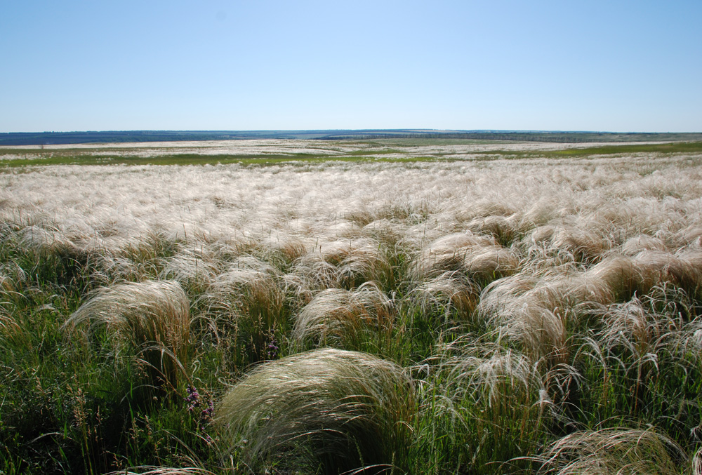 відділення «Стрільцівський степ», Міловський район с.Криничне